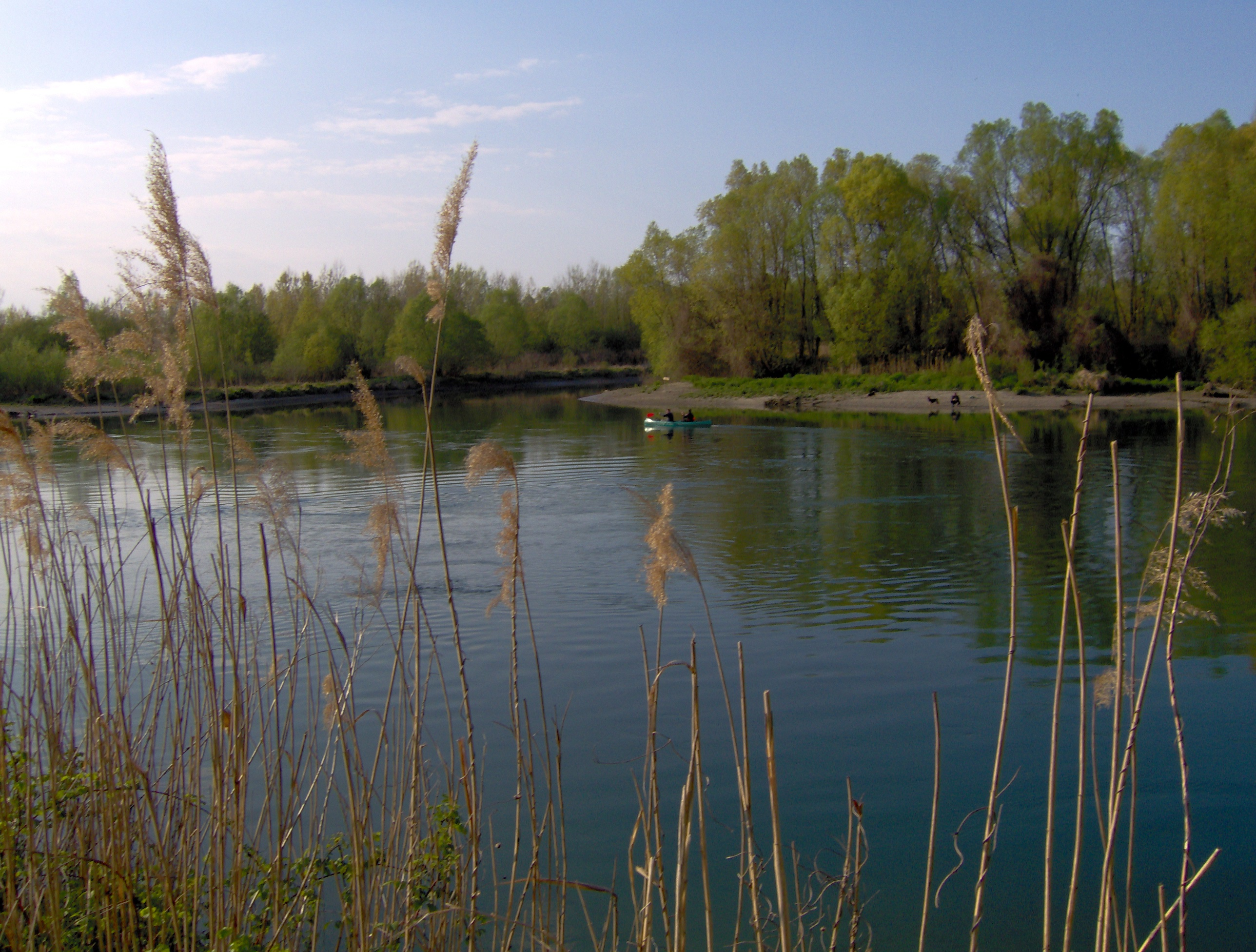 croatia:mura-drava river